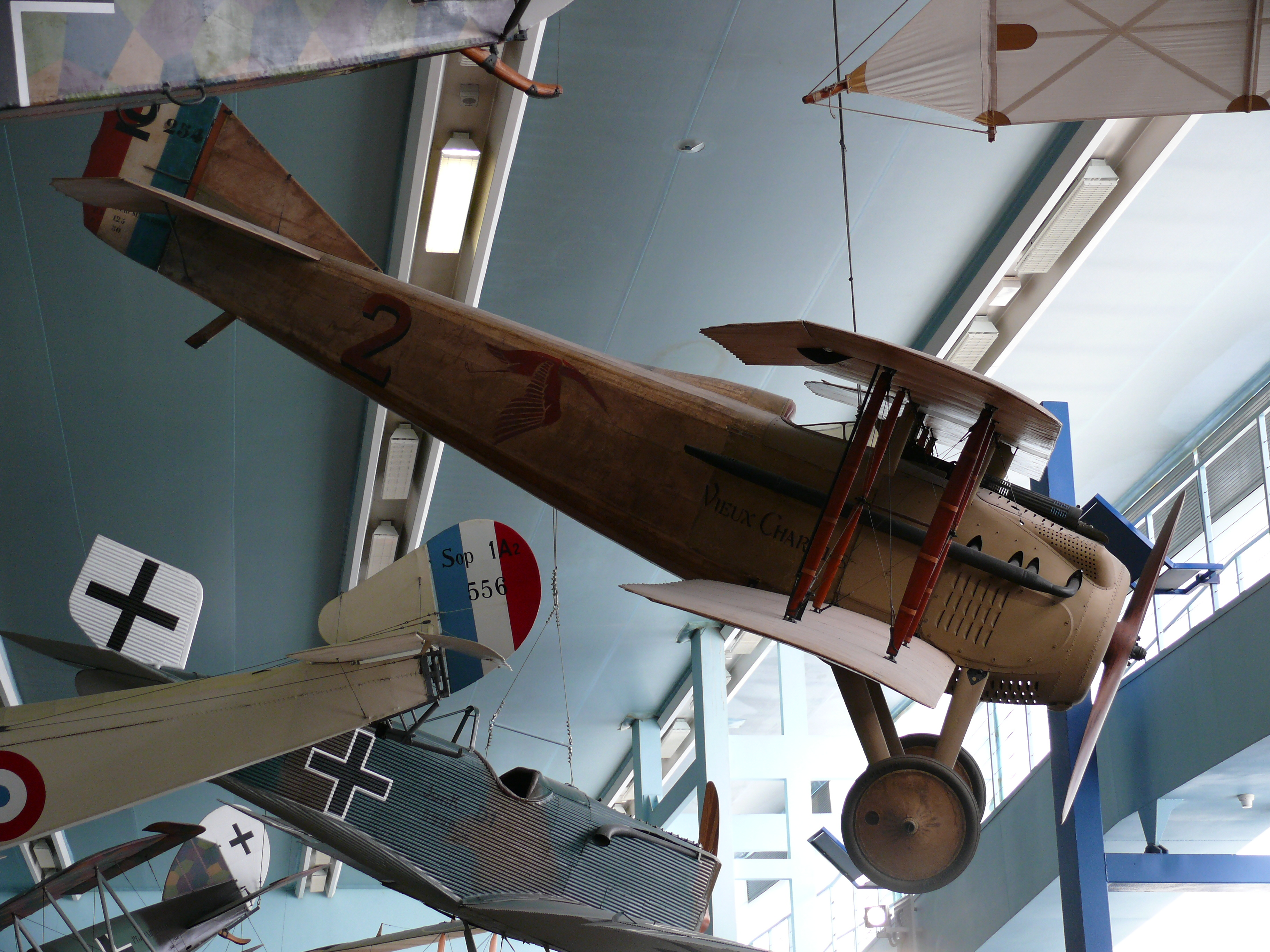 Spad vii